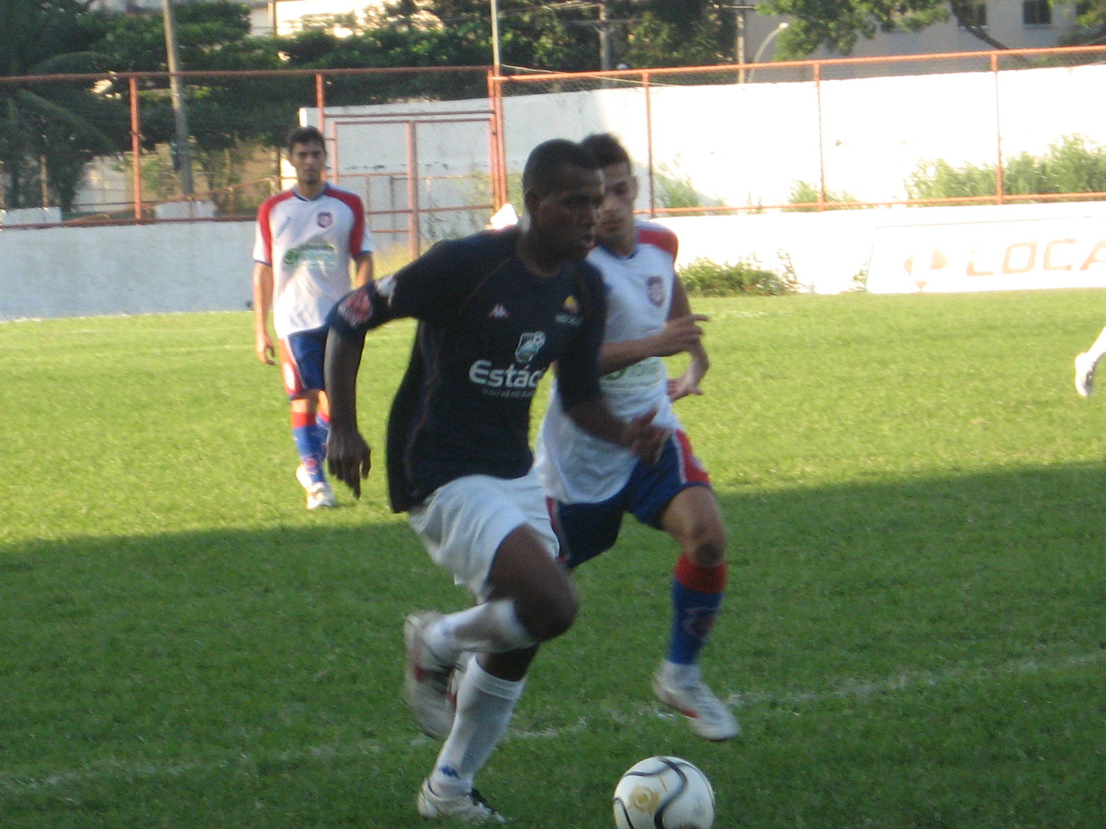 Duelo válido pelo Campeonato Estadual da Série B entre Estácio e Bonsucesso.